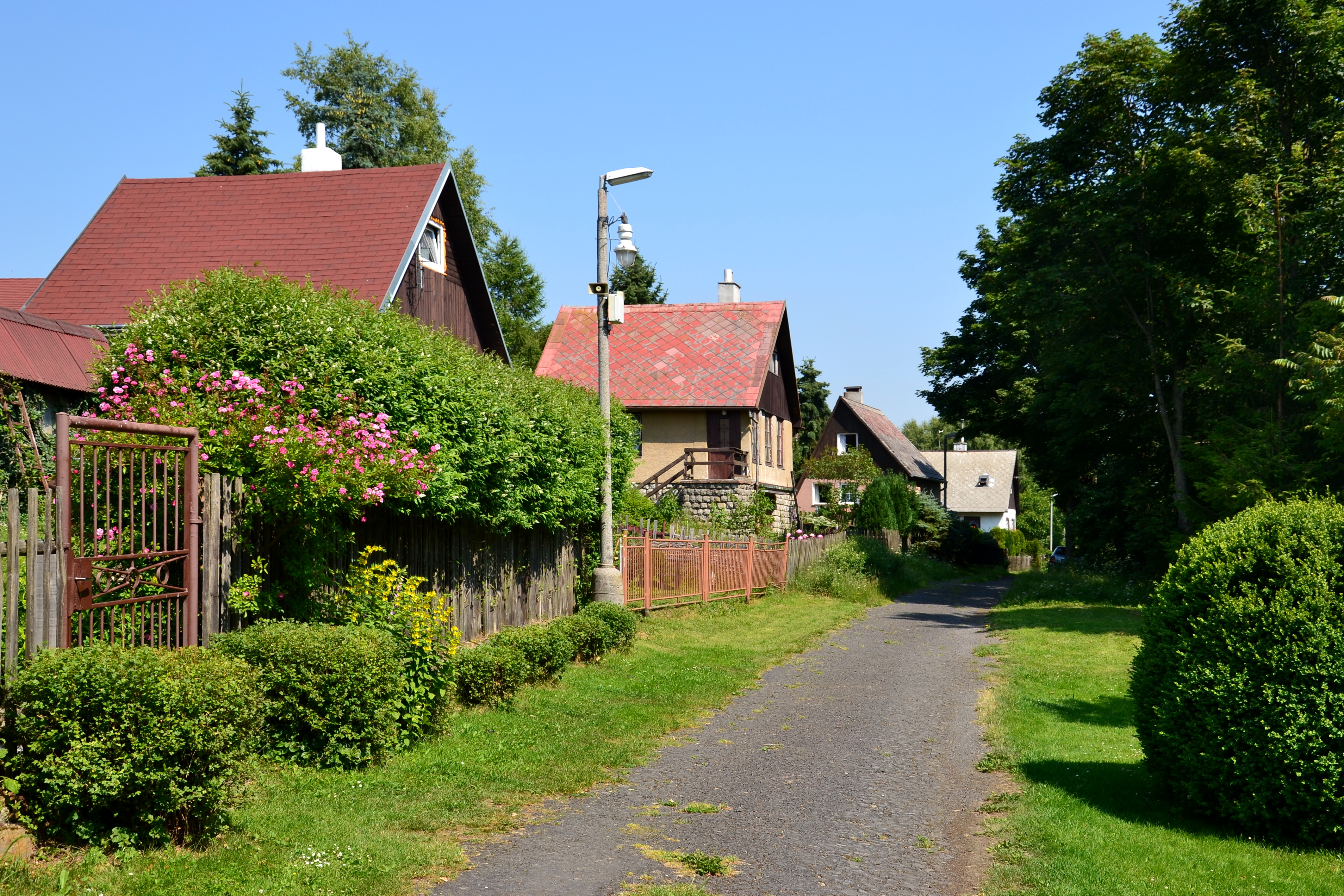 Chaty